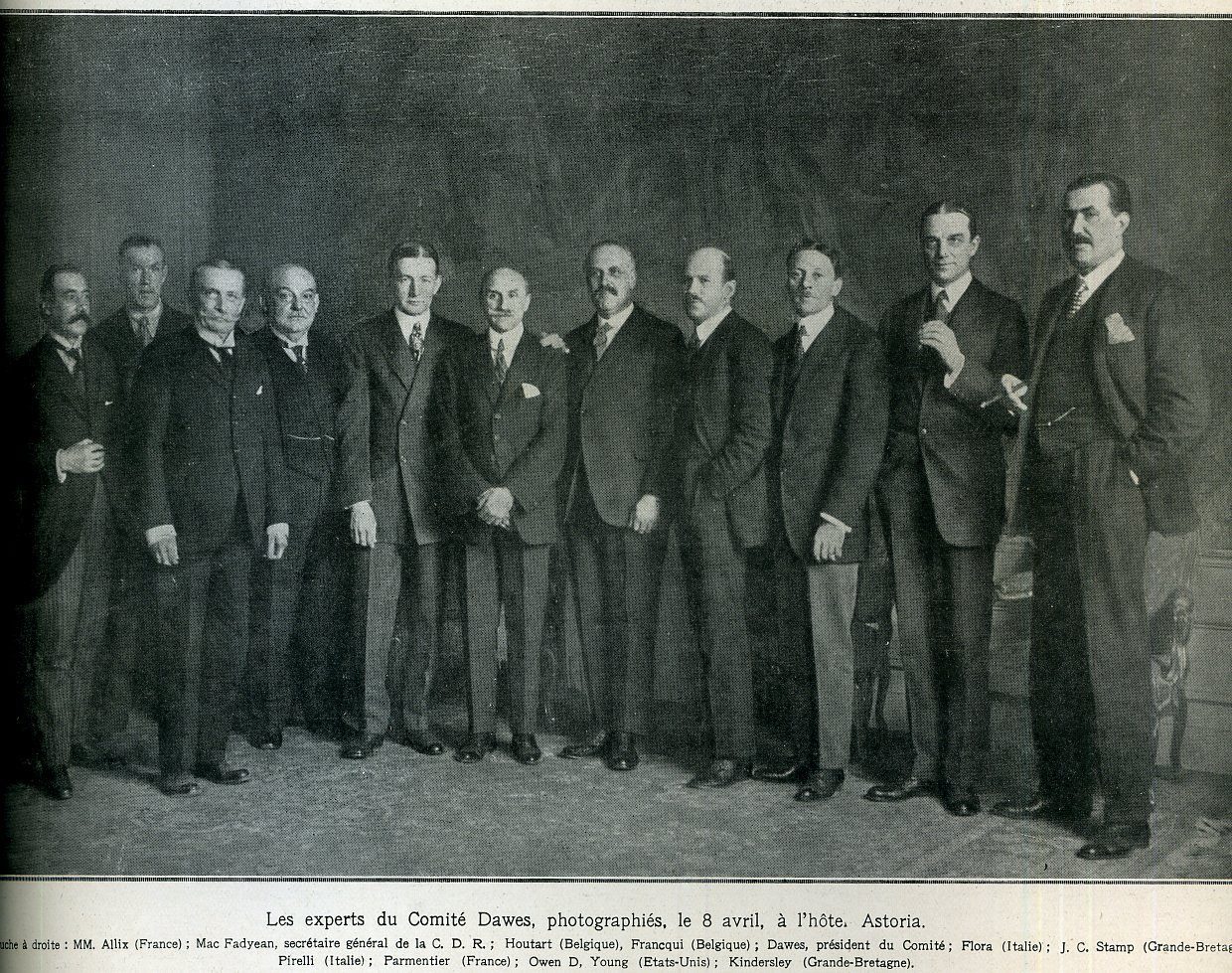 Budget du Reich Allix Mac Fadyean Houtart Francqui Dawes Flora Stamp Pirelli Parmentier Owen Kindersley